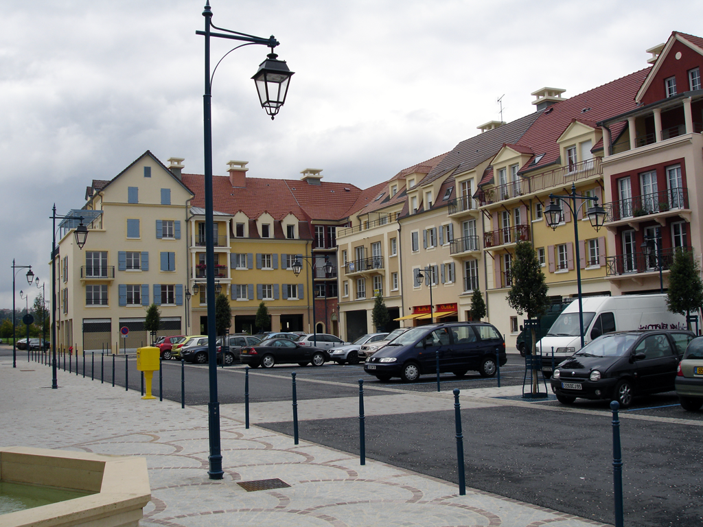 Place du Coeur Battant, Vauréal (Cergy-Pontoise), France.